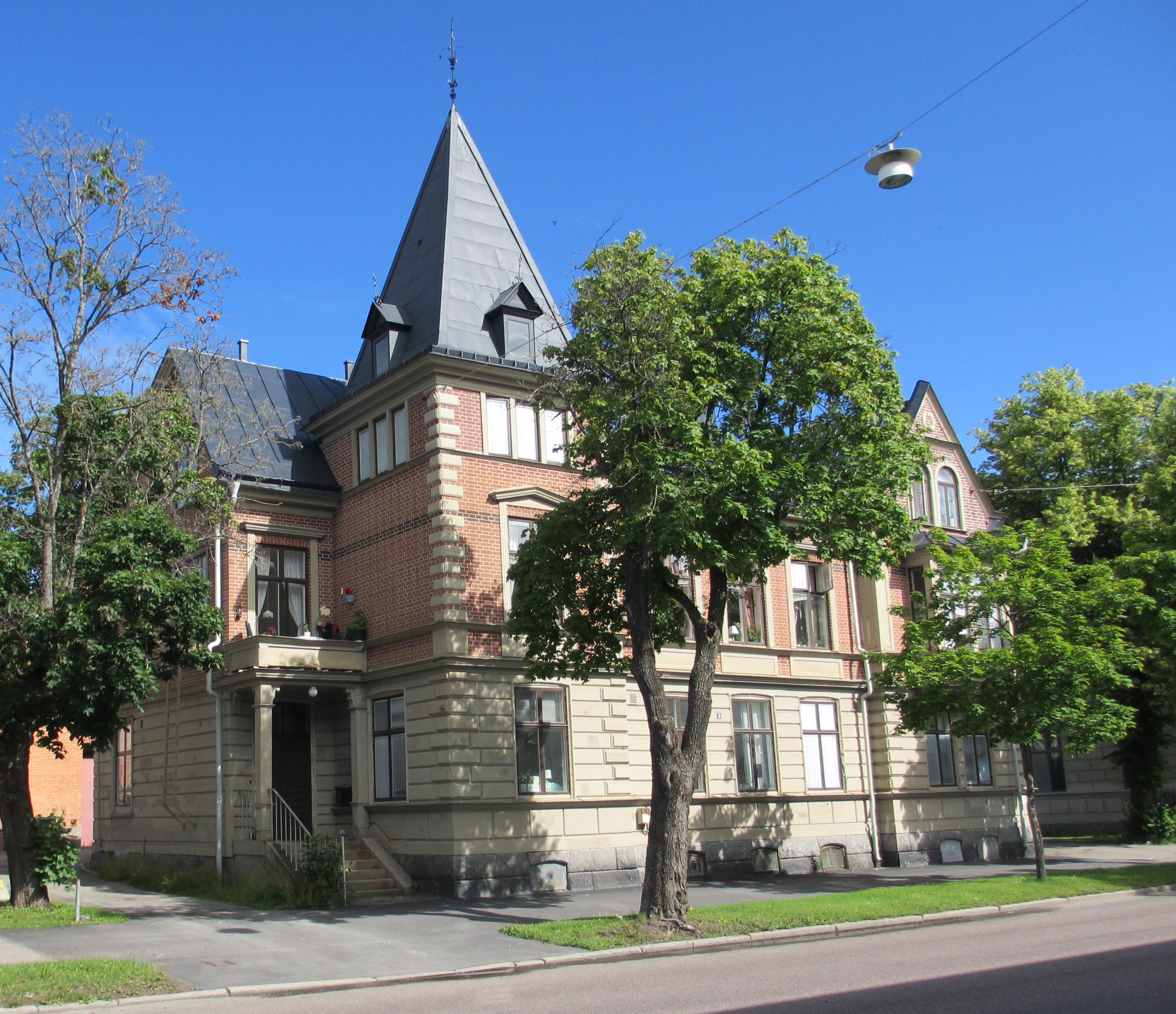 Gamla Energiverket i Söderhamn (1890), arkitekt Gustaf Hultquist